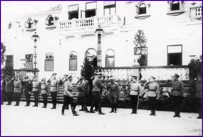 Командування 11 армії перед Палацом сім'ї графів Баворовських. 1915 рік.